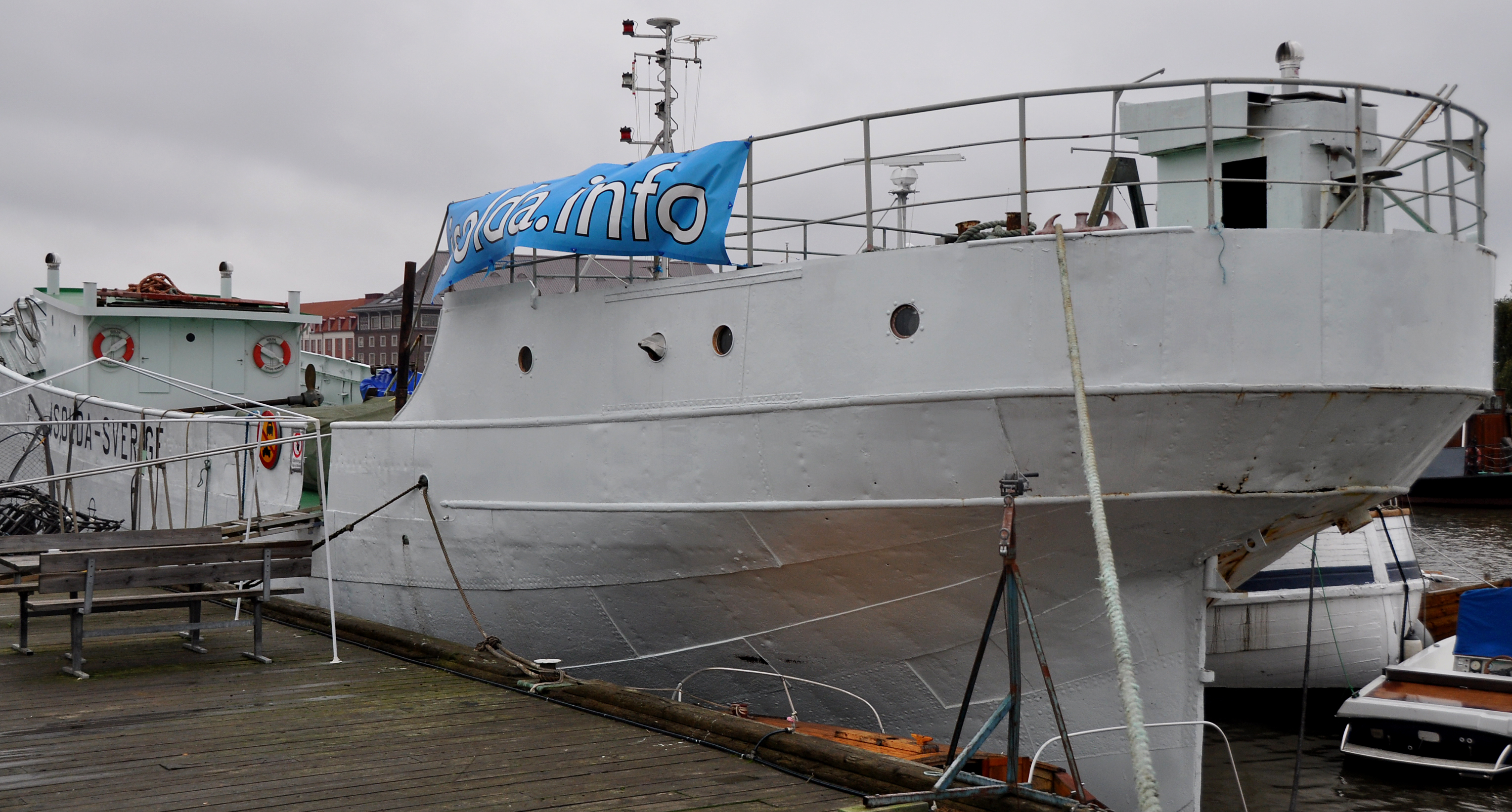 Segelfartyg, tremastad skonare. Byggd på Lödöse varv 1902. Längd 37,13m, bredd 7,98m djup 3,45m. Brt 272 This is an image of the protected Swedish ship S/V ISOLDA, with call sign SMBE .